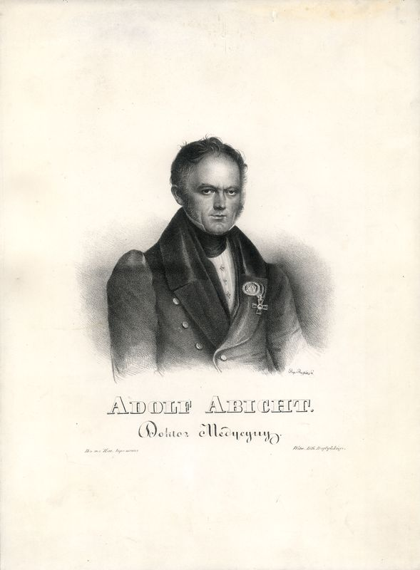 Adolfas Abichtas (1793-1860) - lietuvių medikas, Vilniaus universiteto profesorius. Karolio Ripinskio litografija.